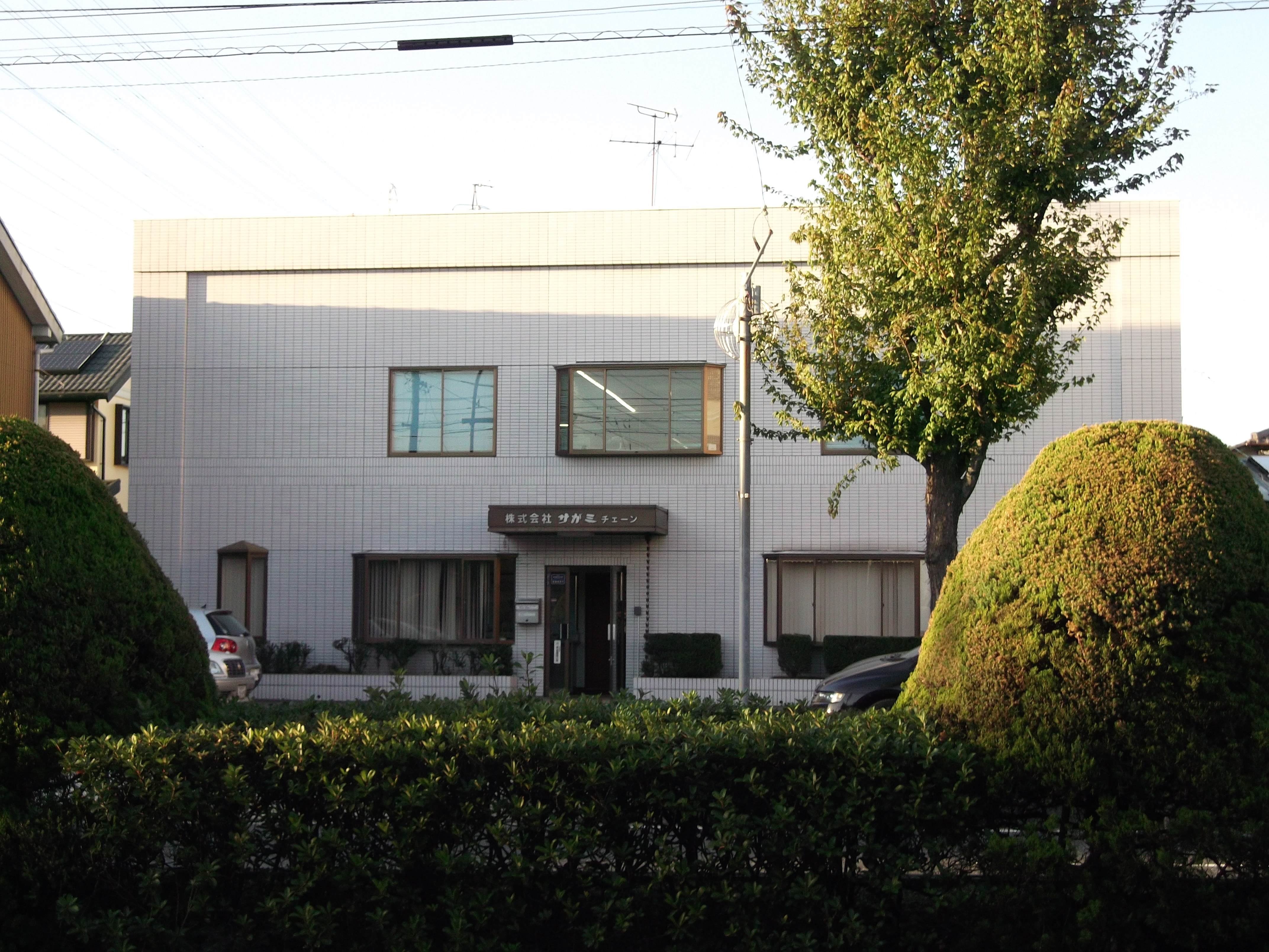 名古屋市守山区森孝のサガミチェーン本社を南側公道より撮影